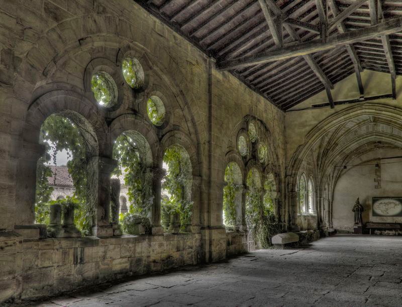 Vista interior del Claustro de la Colegiata de Santillana del Mar (DavidDaguerro)